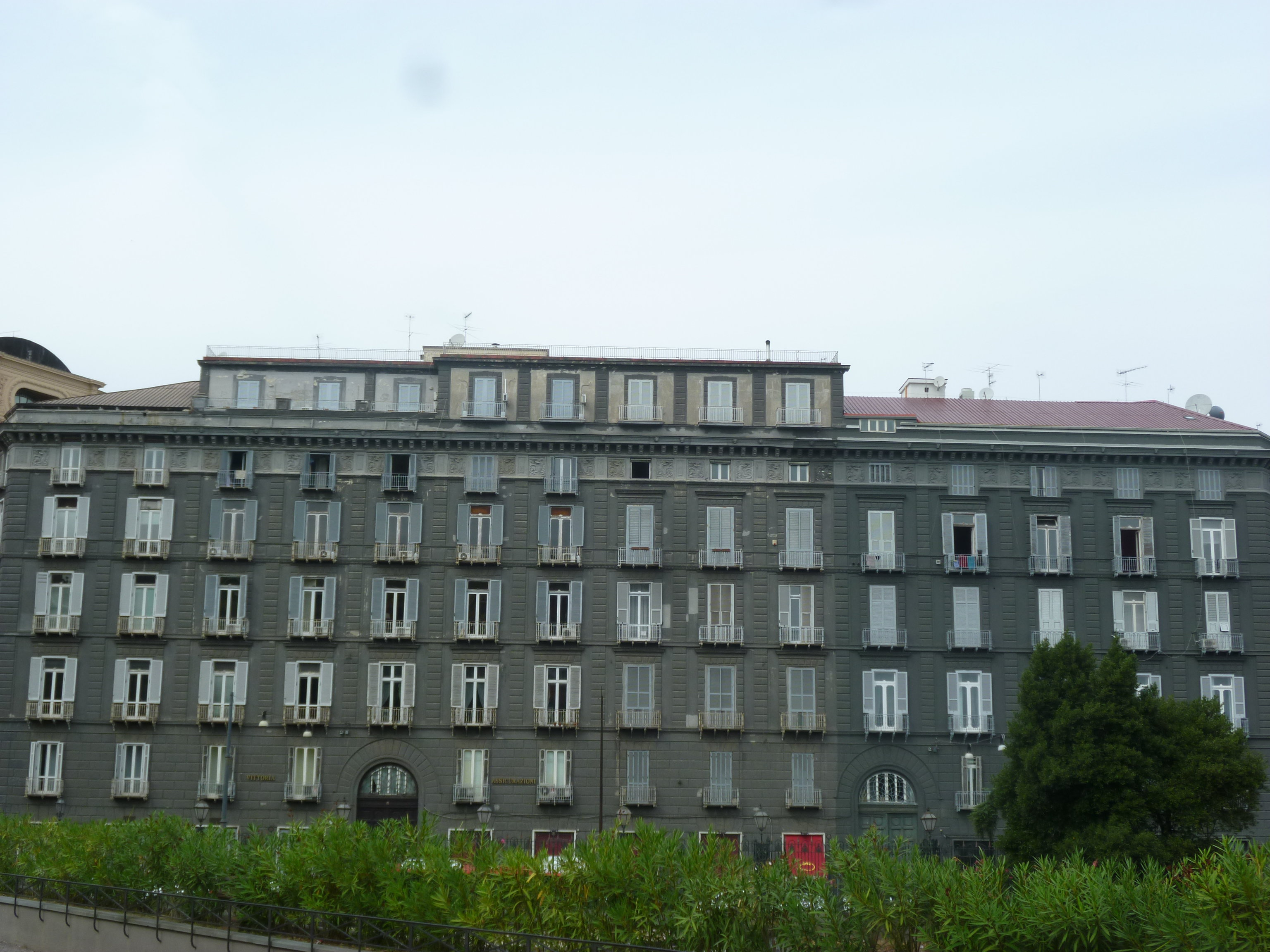 Napoli